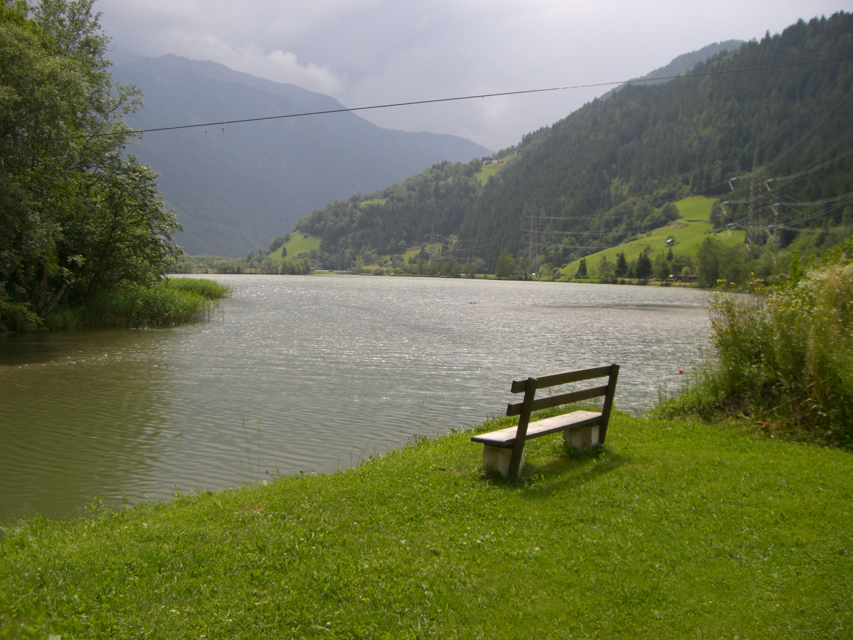 Gößnitzer Stausee, Mölltal, Carinthia, Austria